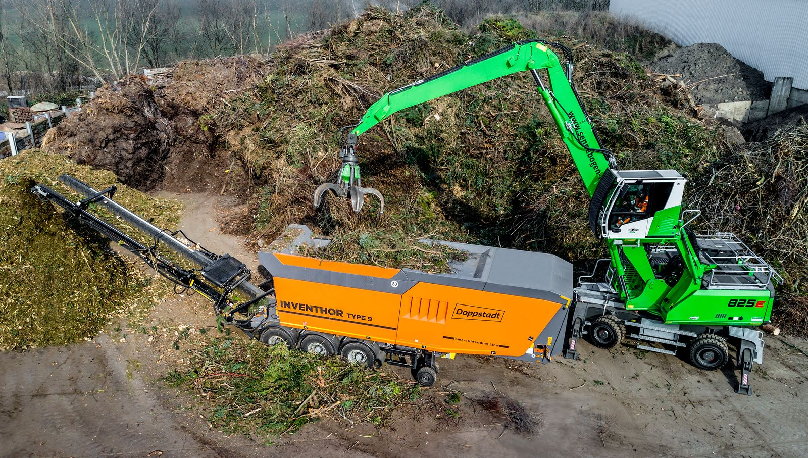 langsam laufender Walzenzerkleinerer - Iventhor Type 9